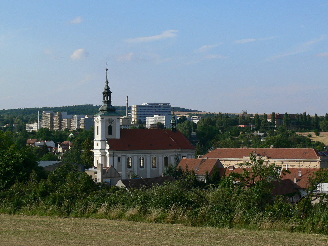 Dědice, kostel, střední zdravotnická škola, kasárna, areál vojenských škol